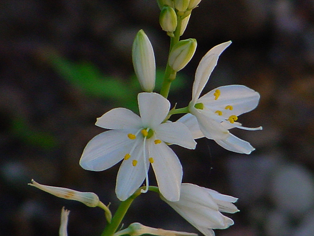 Phalagère à fleurs de Lis (Anthericum liliago)